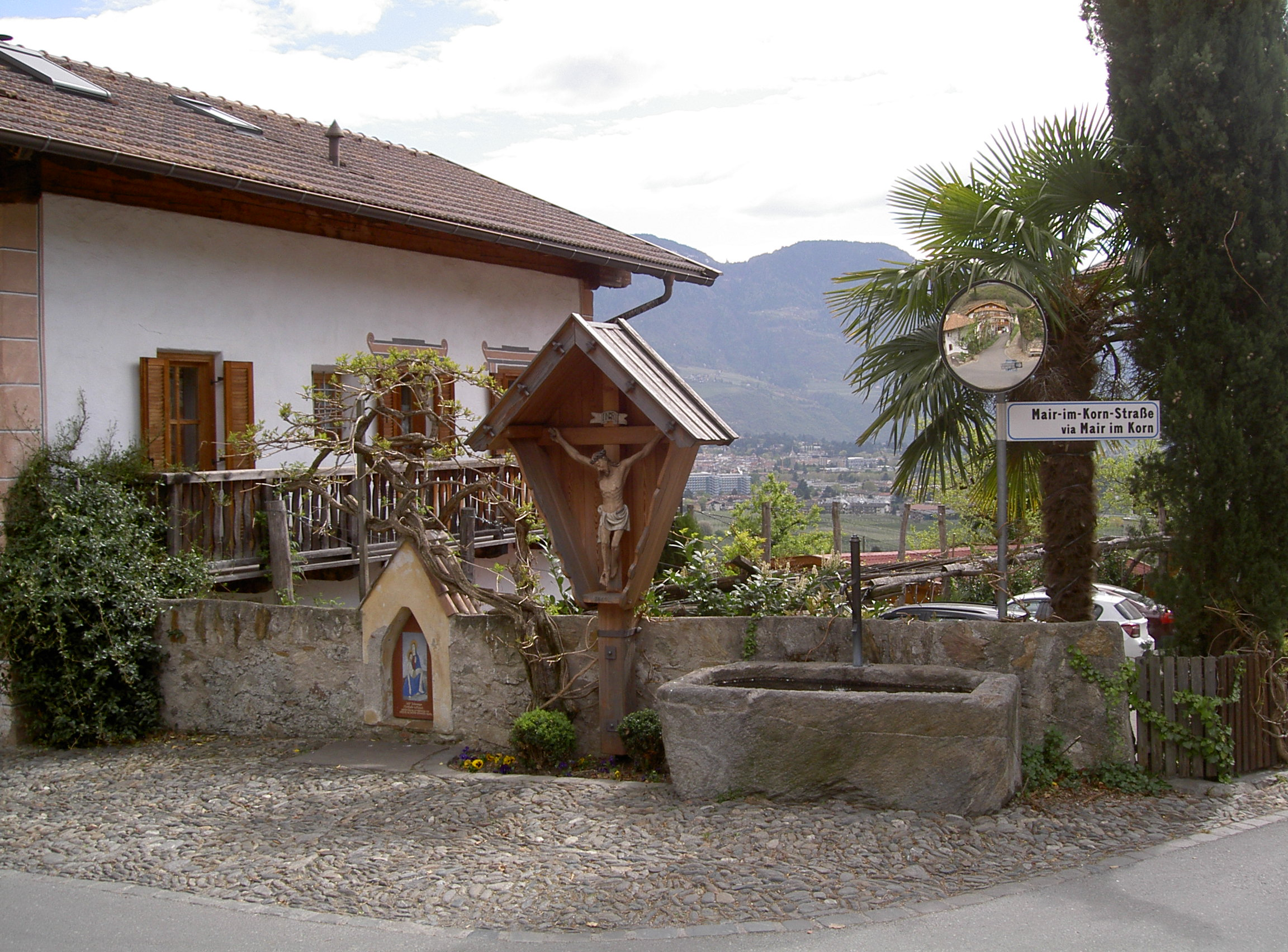 Brunnen mit Jesus Kreuz am Platterhof, neben der Pfarrkirche St. Hippolyt in Dorf-Algund